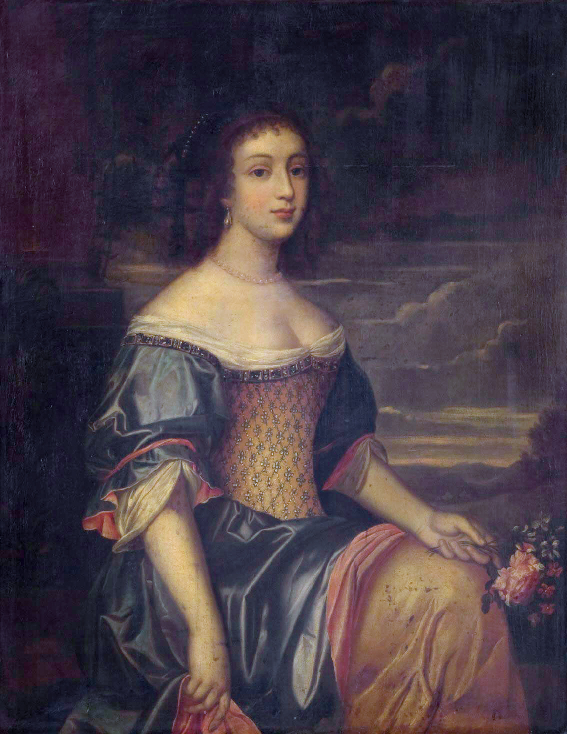 Portrait d'une femme inconnue vers 1660